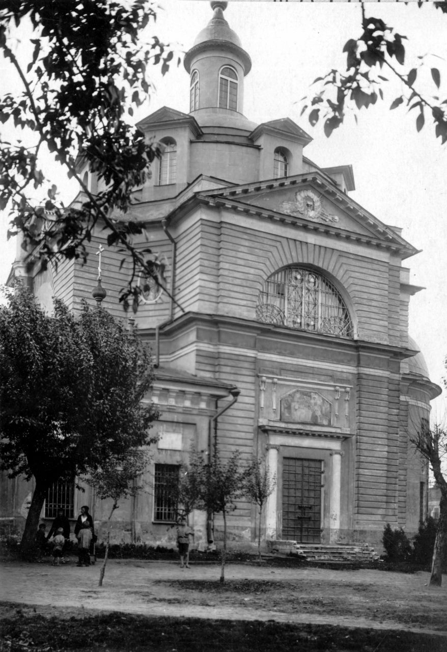 Москва храм Усекновения главы Иоанна Предтечи в Казенной слободе